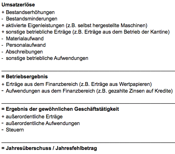 Detaillierte Übersicht über Gewinn und Verlustrechnung mit dem Jahresüberschuss / Jahresfehlbetrag als Ergebnis.